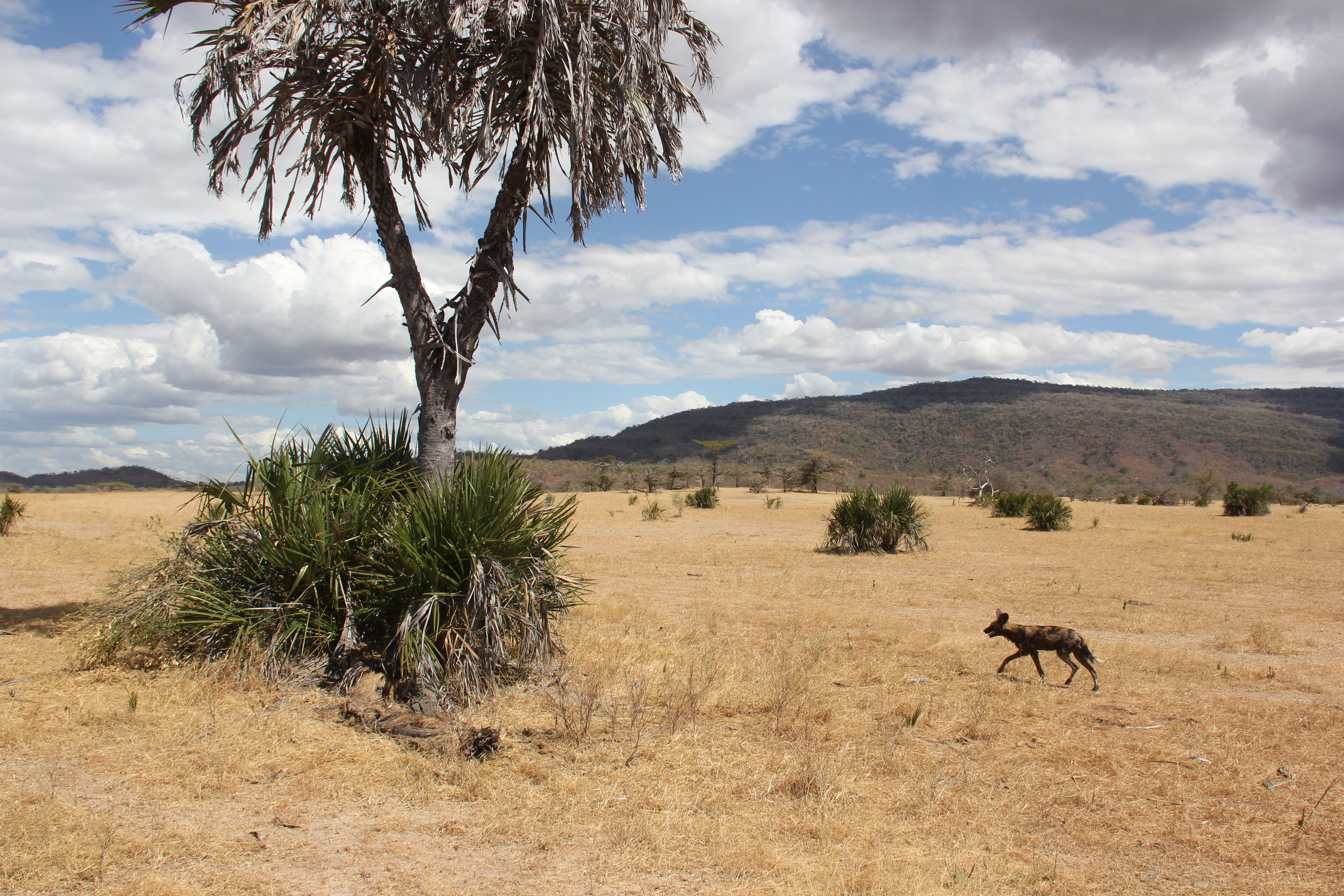 African Wild Dog in Tanzania